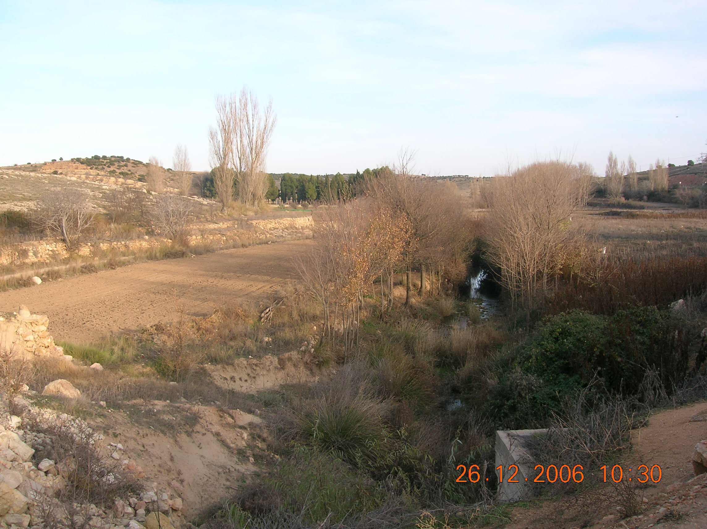 Río Lezuza a su paso por el puente de la villa homónima, en Albacete (España)